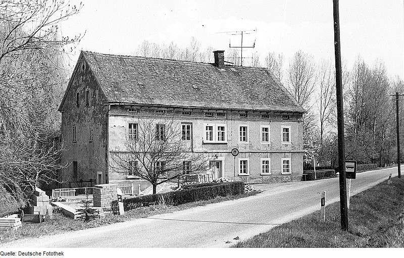 Original image description from the Deutsche Fotothek Neschwitz-Weidlitz. Kobanmühle